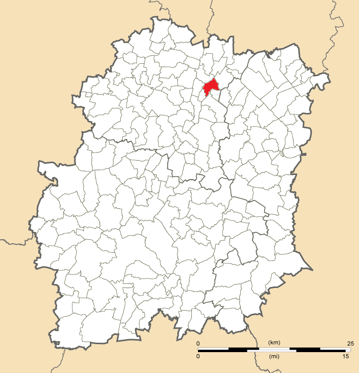 Carte de position d'Épinay-sur-Orge en Essonne (91)